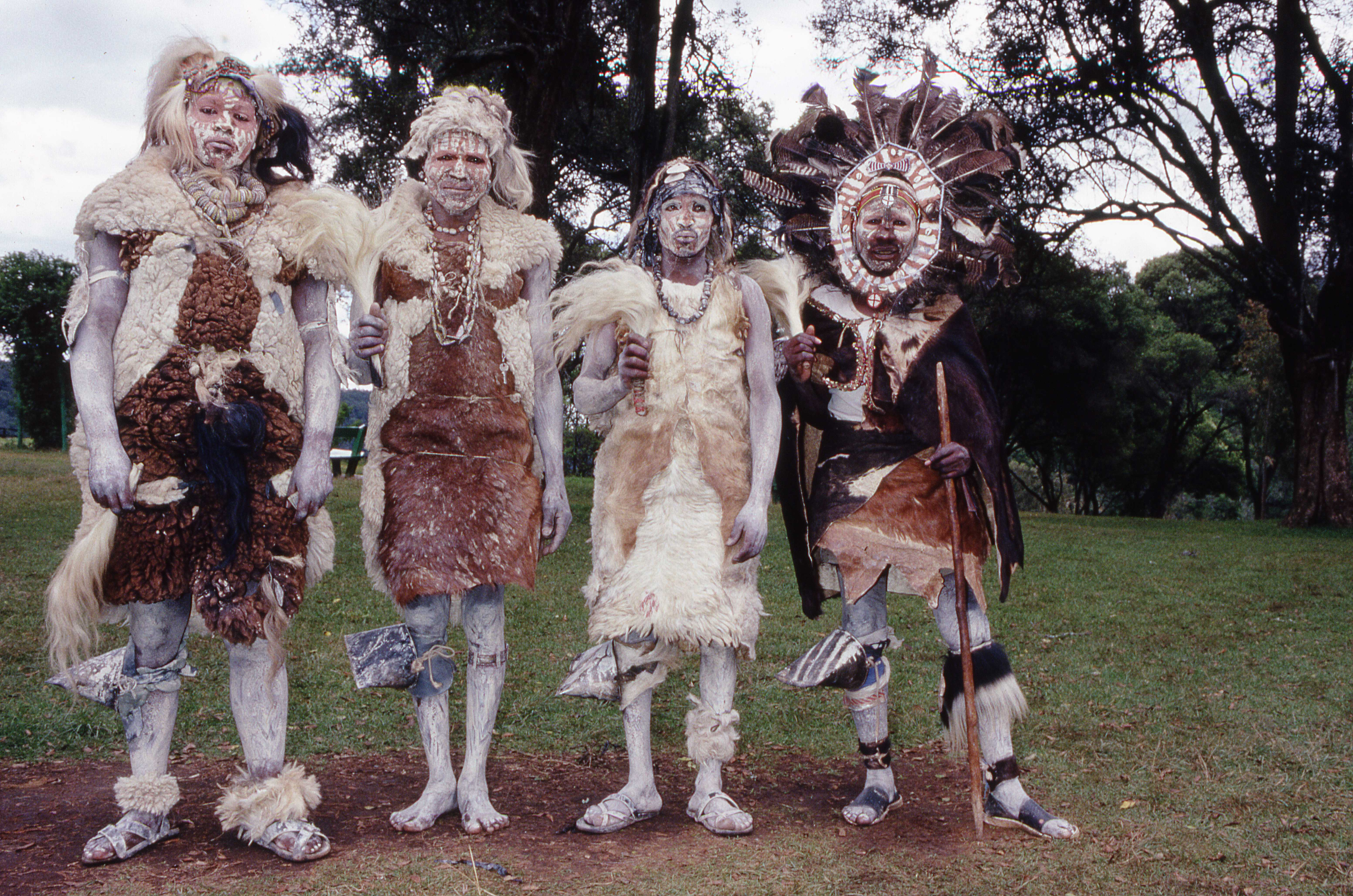 Tanzanie Kikuyu Leica M6 1989